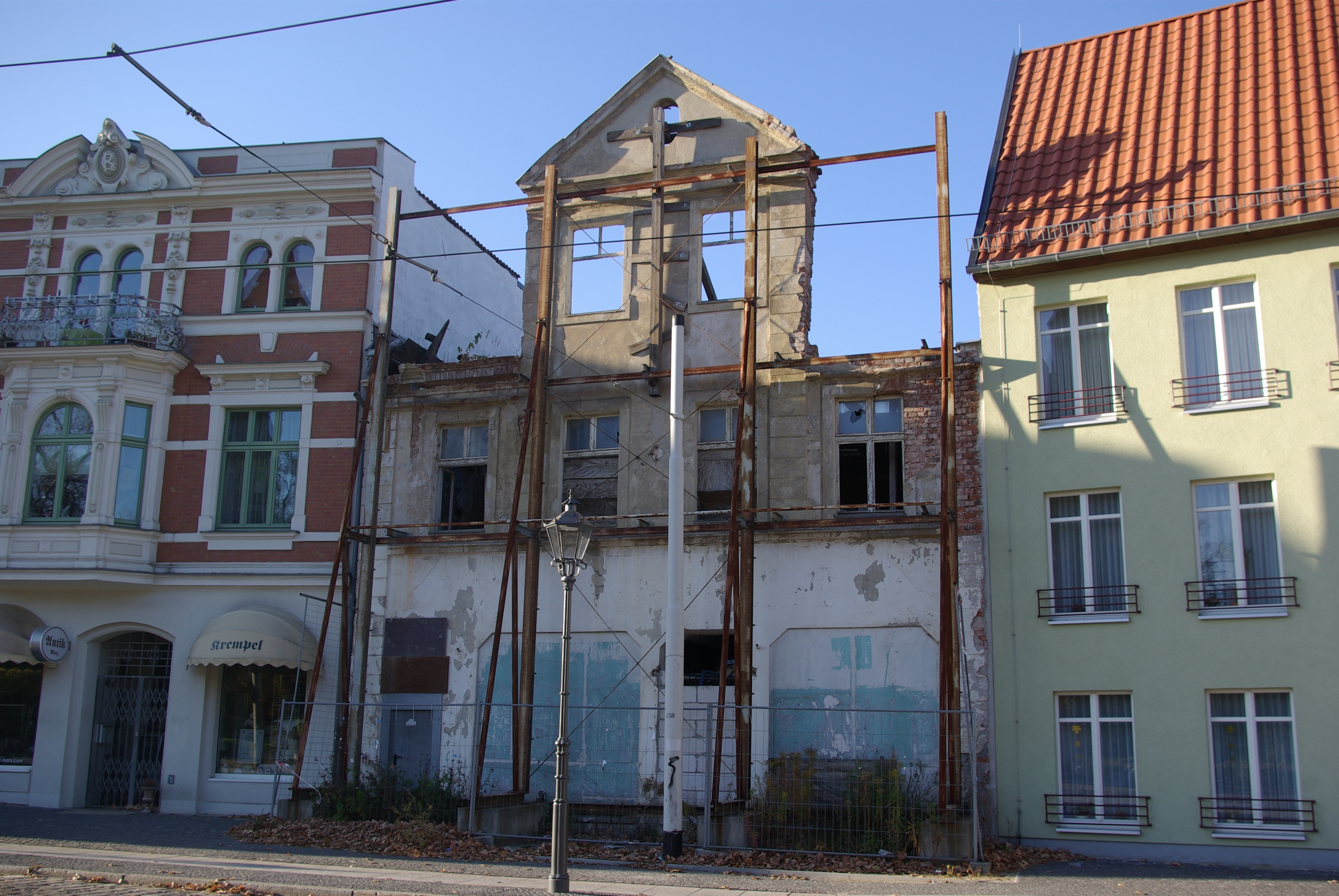 Cottbus in Brandenburg. Das Haus in der Sandower Straße steht unter Denkmalschutz. Das Haus verfällt.